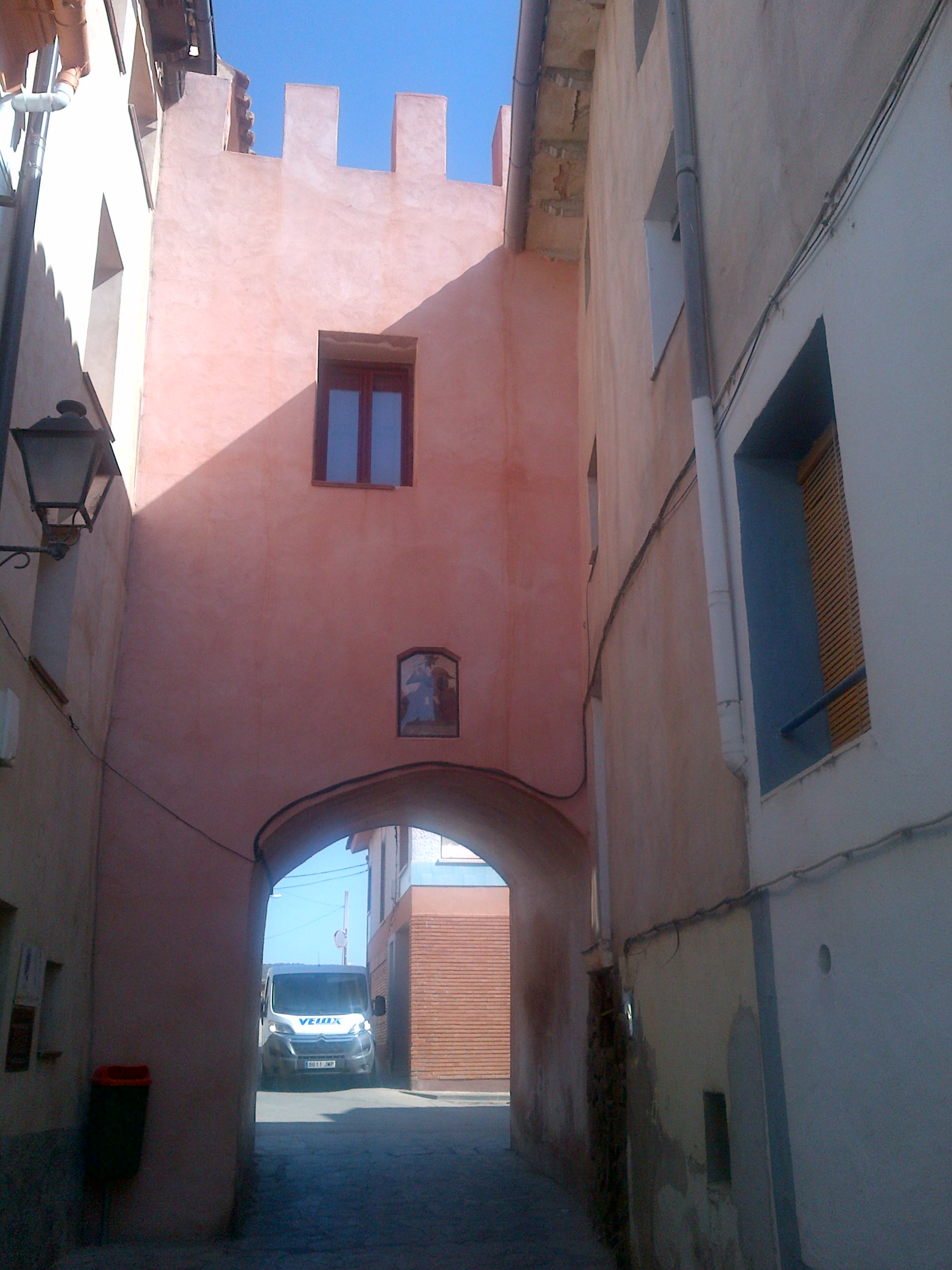 Arco-capilla de San Miguel de Atecavisto desde el exterior de la villa